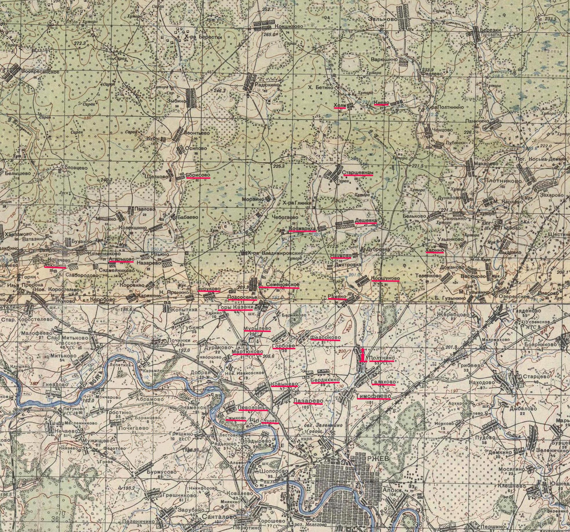 Фрагмент карты 1940-х годов. Подчёркнуты деревни, из которых перезахоронены погибшие в братскую могилу в Полунино.